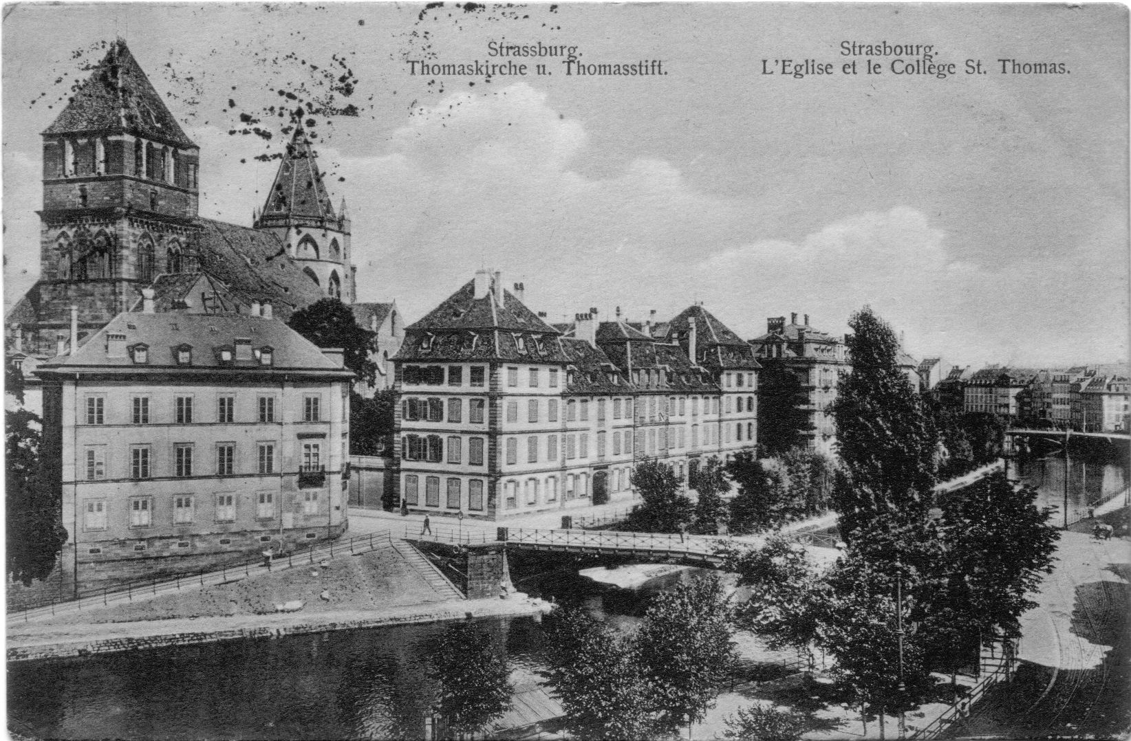 Ancienne carte postale de Strasbourg.